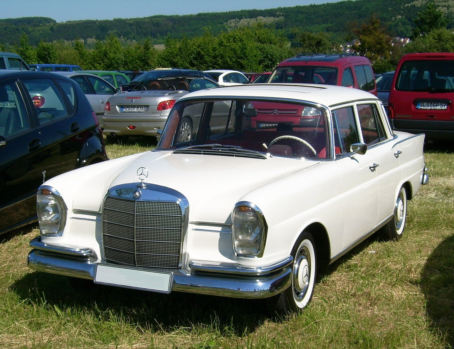 Mercedes 230 s